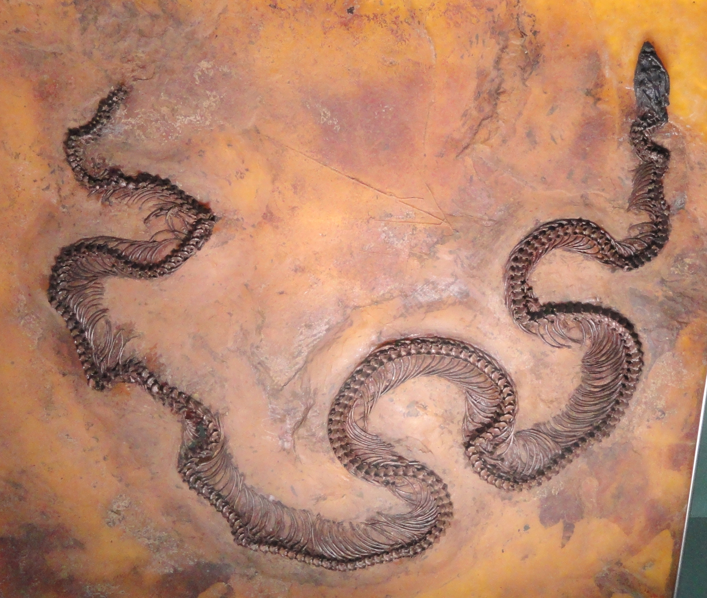 Exhibit in Naturmuseum Senckenberg, Frankfurt am Main, Germany.